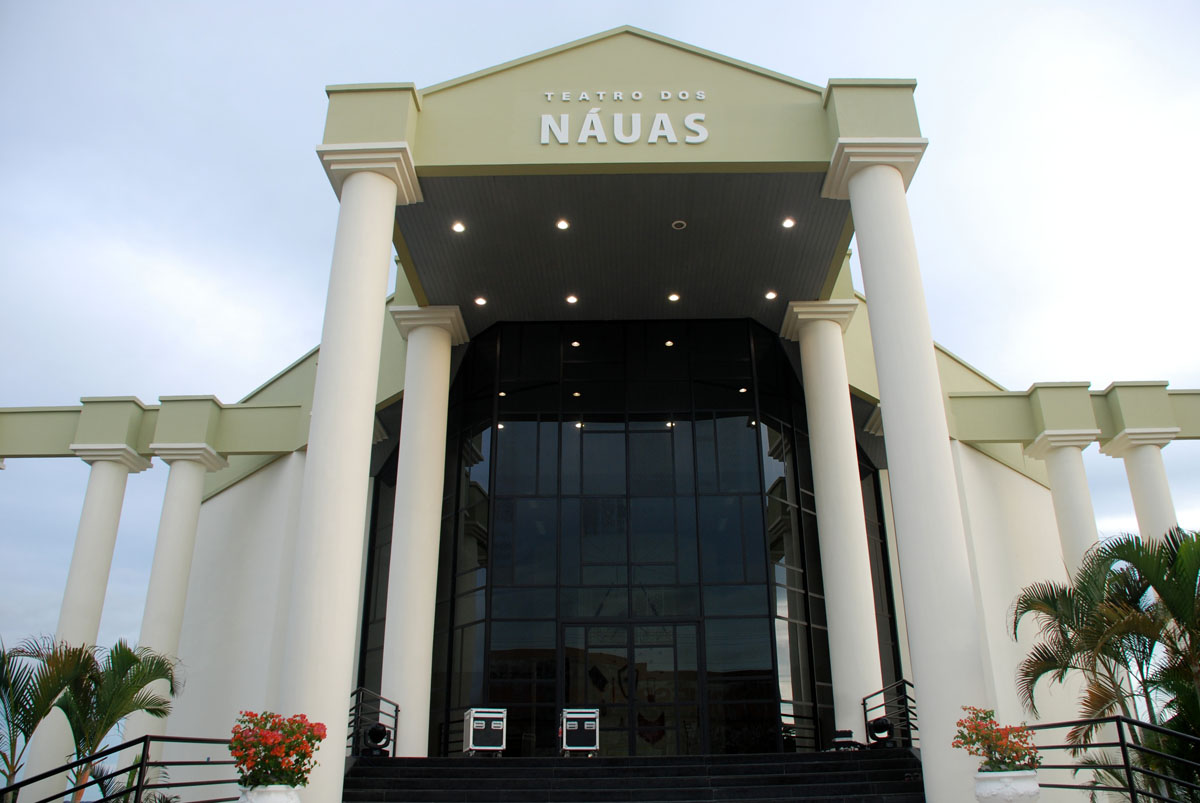 Inauguração do Teatro dos Náuas na cidade de Cruzeiro do Sul, Acre